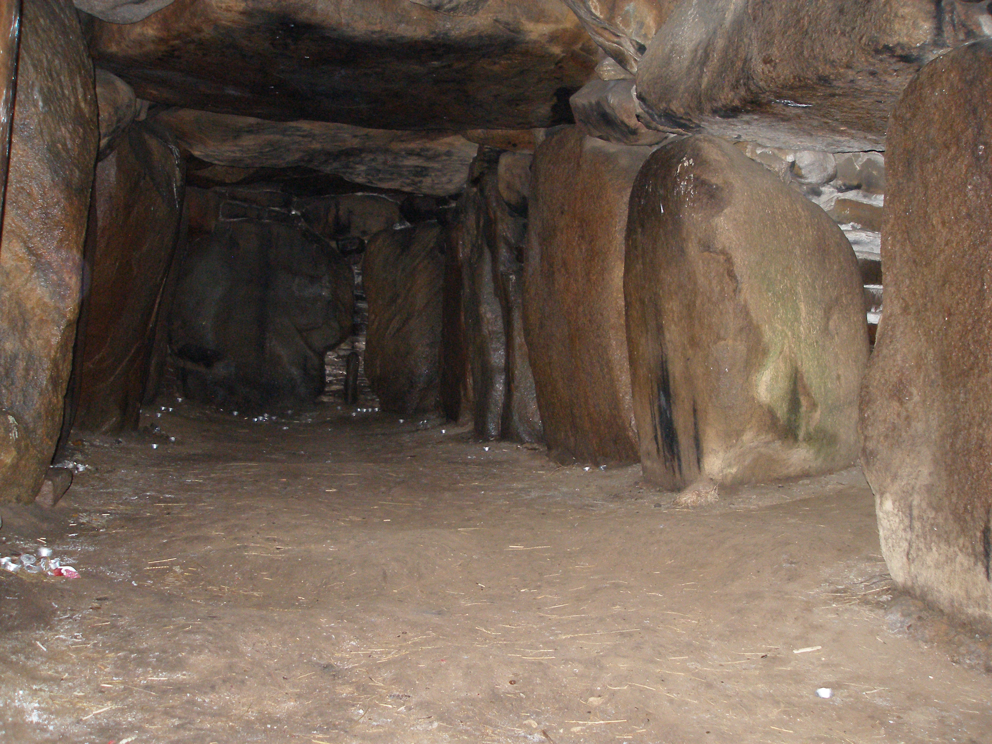 Mårup Jættestue, Hindsholm, Fyn